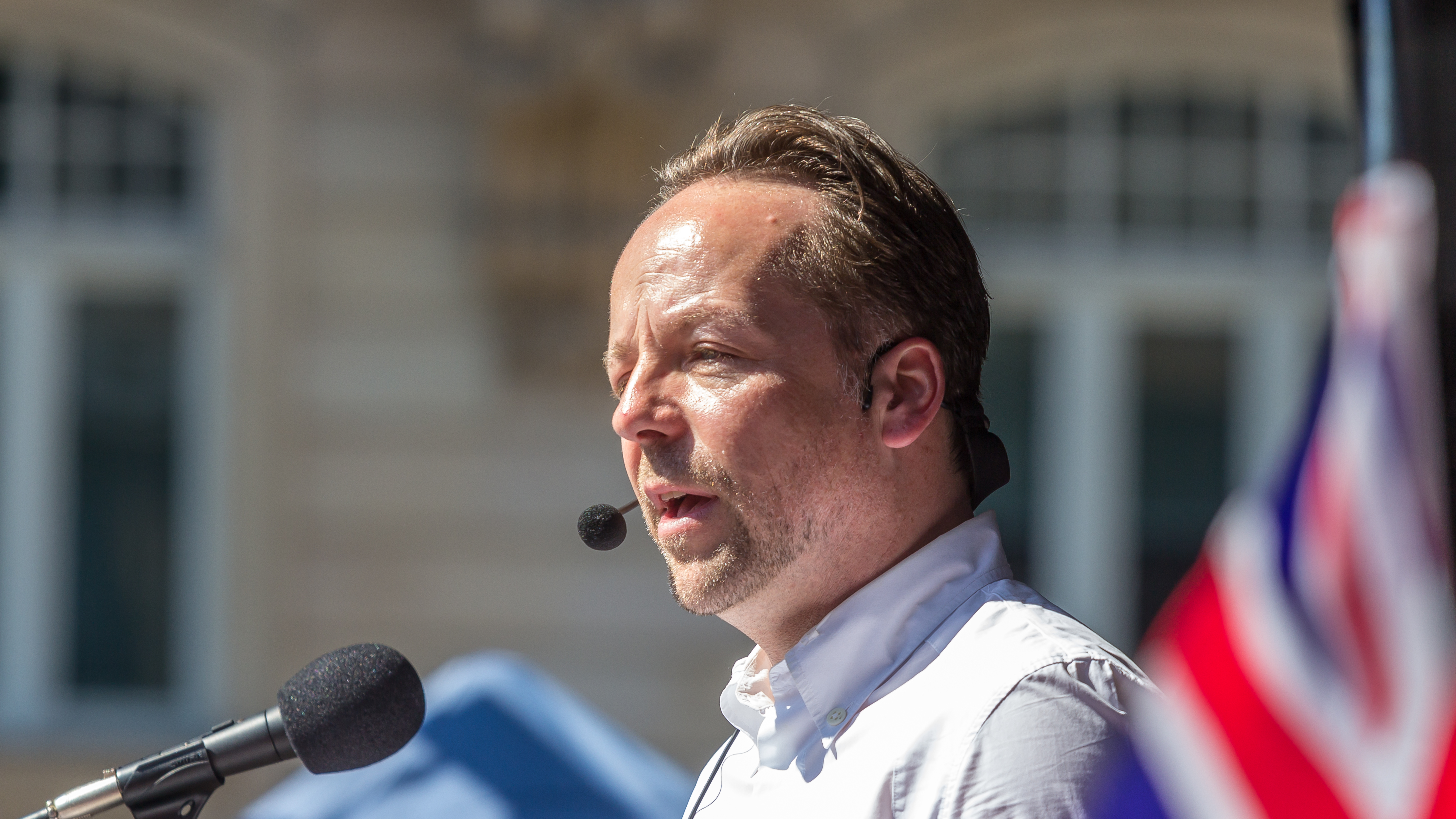 Pulse of Europe auf dem Goetheplatz in Frankfurt am Main Foto: Daniel Röder, Mitbegründer der pro-europäischen Bürgerbewegung